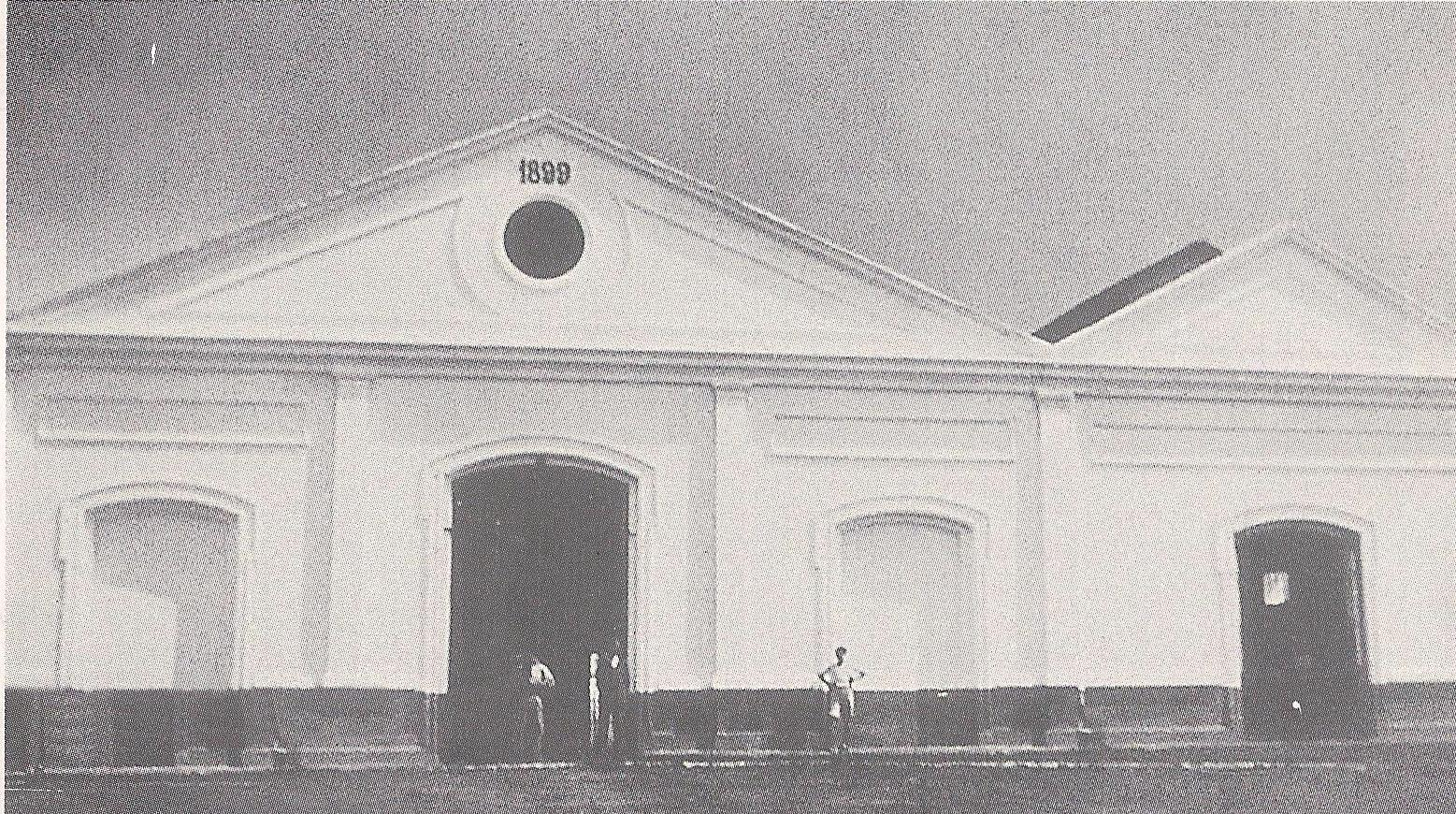 Matadouro de Curitiba